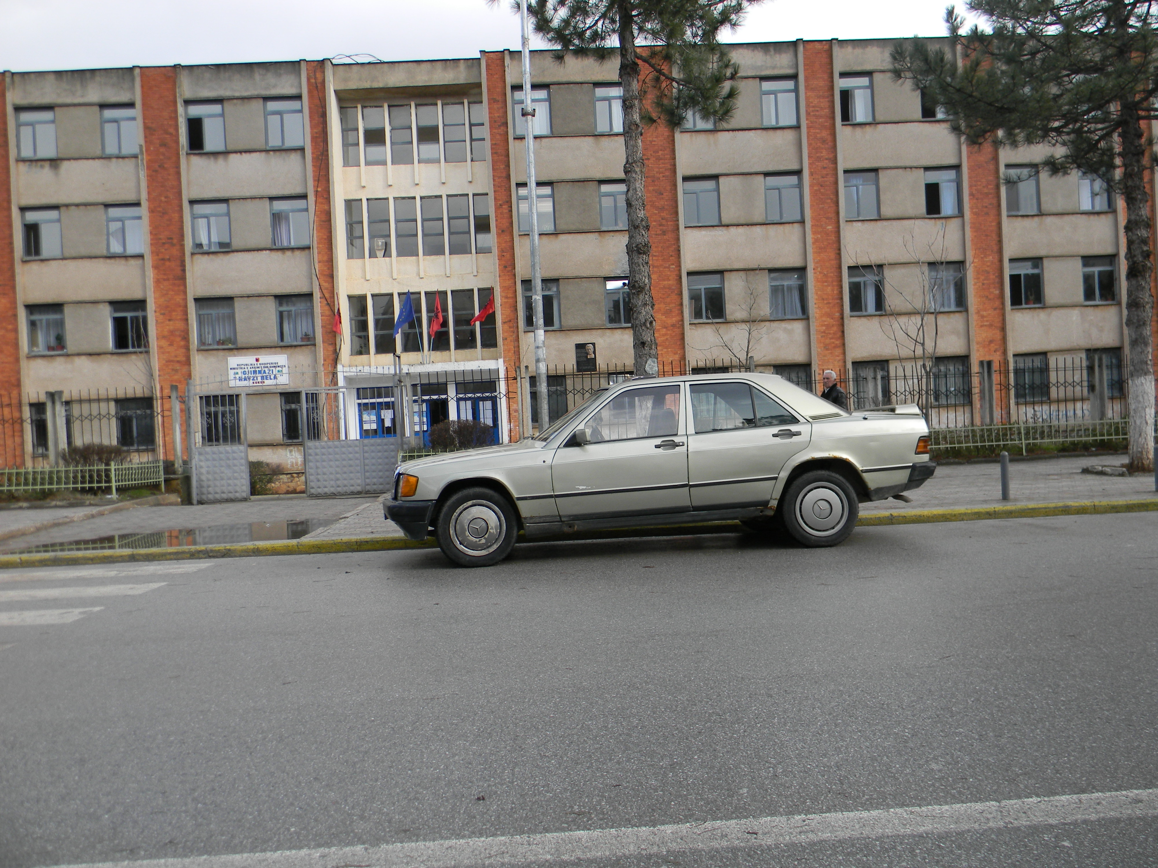 Shkolla e mesme Havzi Nela ne Kukes